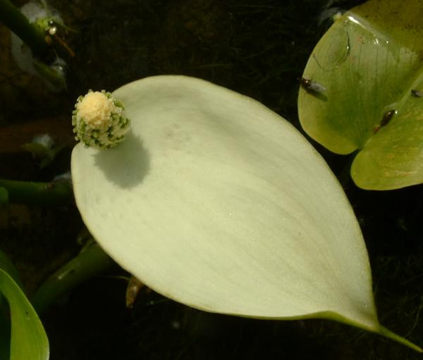 Calla palustris, photo J.F. Gaffard, Acorus (jardin aquatique) Autoreille, mai 2004, licence GFDL J.F. Gaffard mai 2004